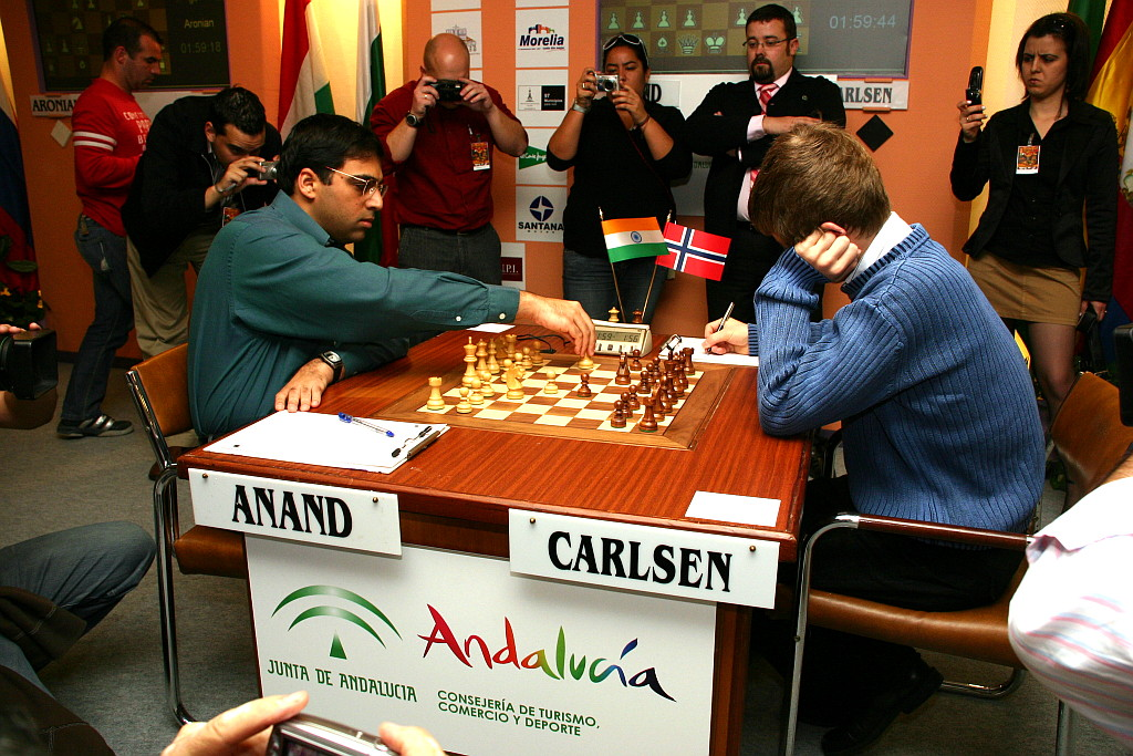 Anand (blancas) vs. Builes (negras)